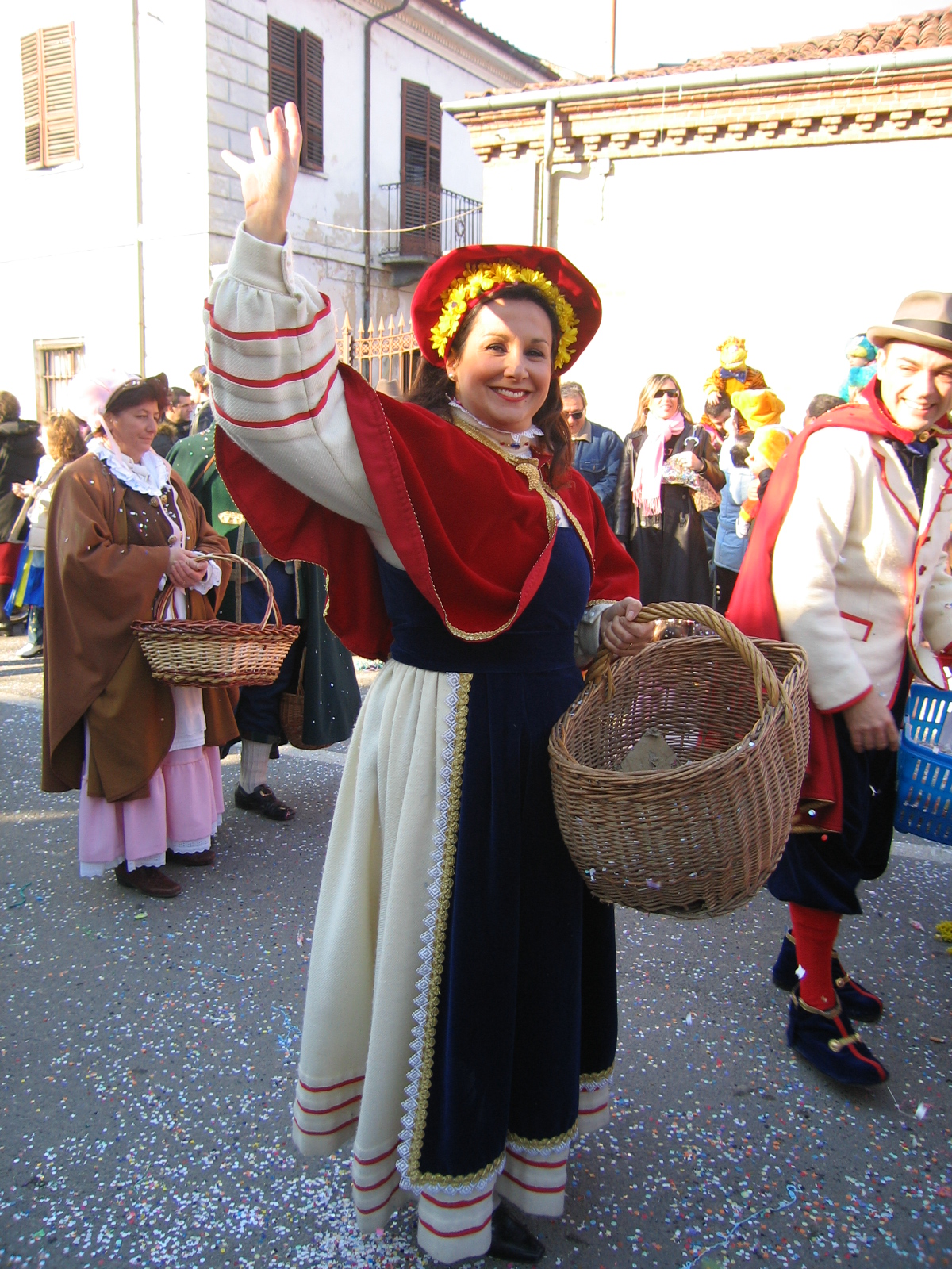 Praje e Marghera (in primo piano), le maschere del carnevale airaschese.